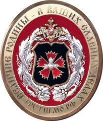 Эмблема Главного Разведывательного Управления Генерального Штаба Министерства Обороны Российский Федерации.